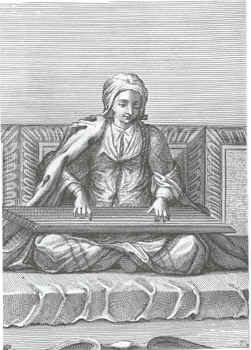 Ancien Quanoun rectangulaire